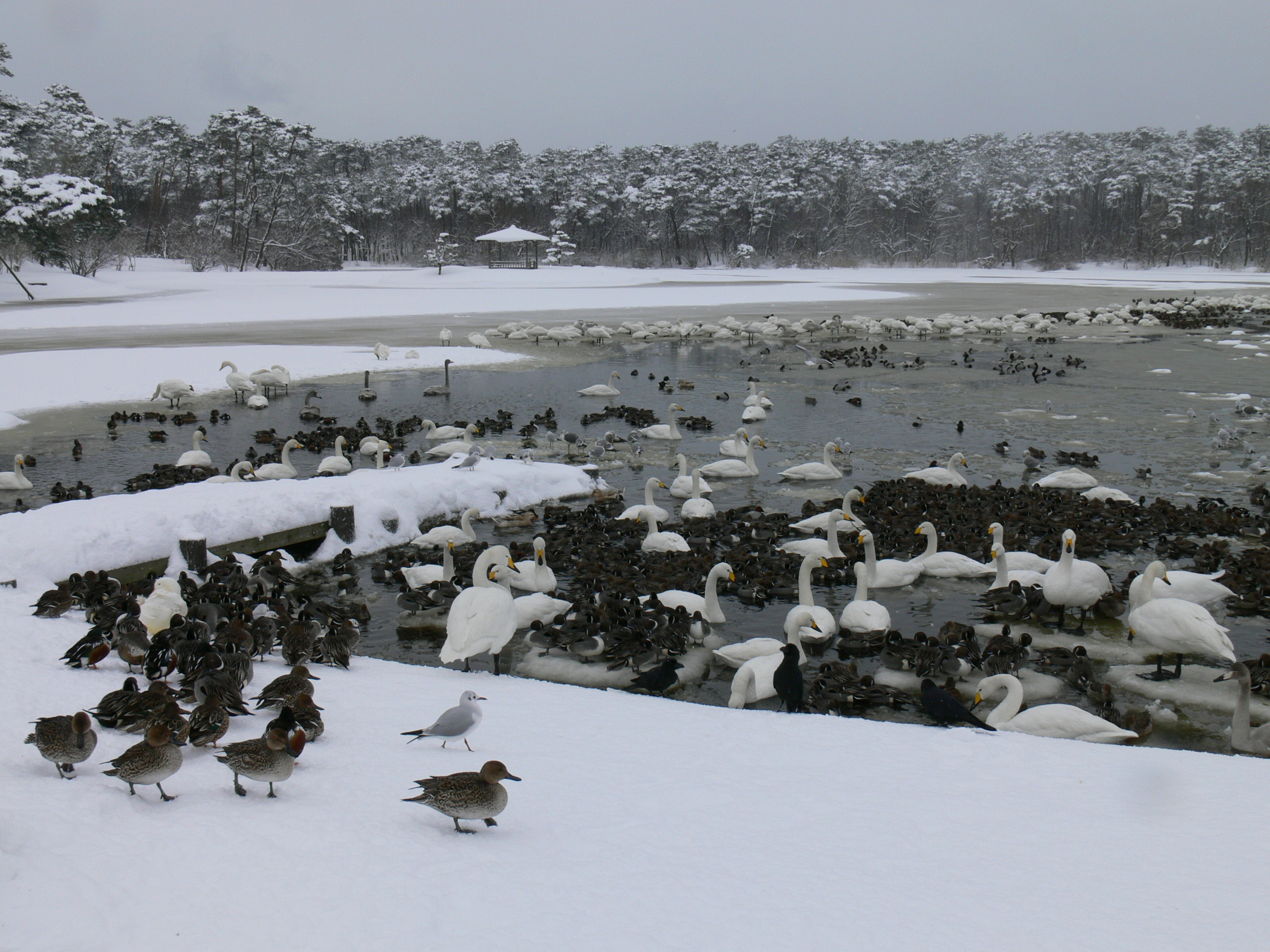 お幕場森林公園